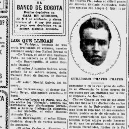 Página que recoge las elogiosas palabras del grado como Doctor en Derecho, Ciencias Políticas y Sociales otorgado por la Universidad Libre de Colombia.